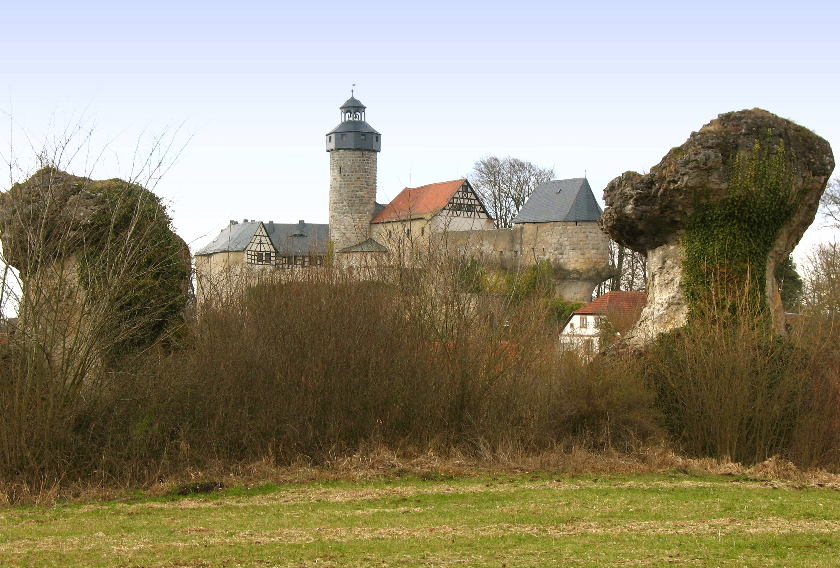 Blick durch die Zschokkefelsen auf die Burg Zwernitz (Sanspareil)